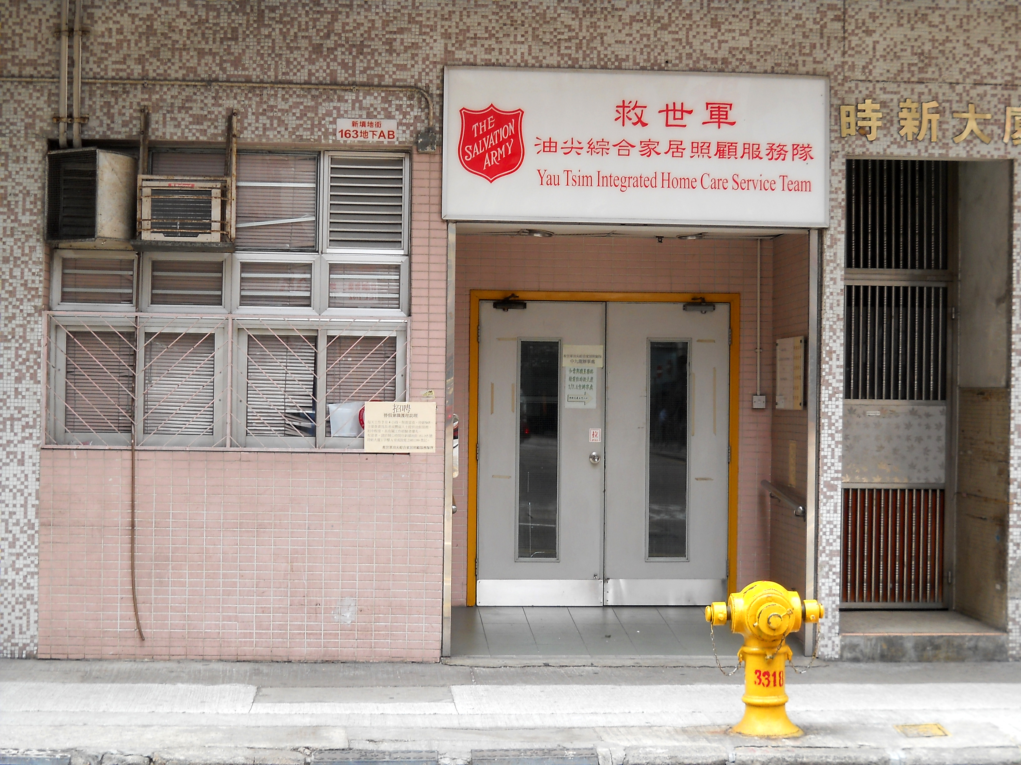 中文（香港）: 救世軍港澳軍區油尖綜合家居照顧服務隊（中九龍辦事處）